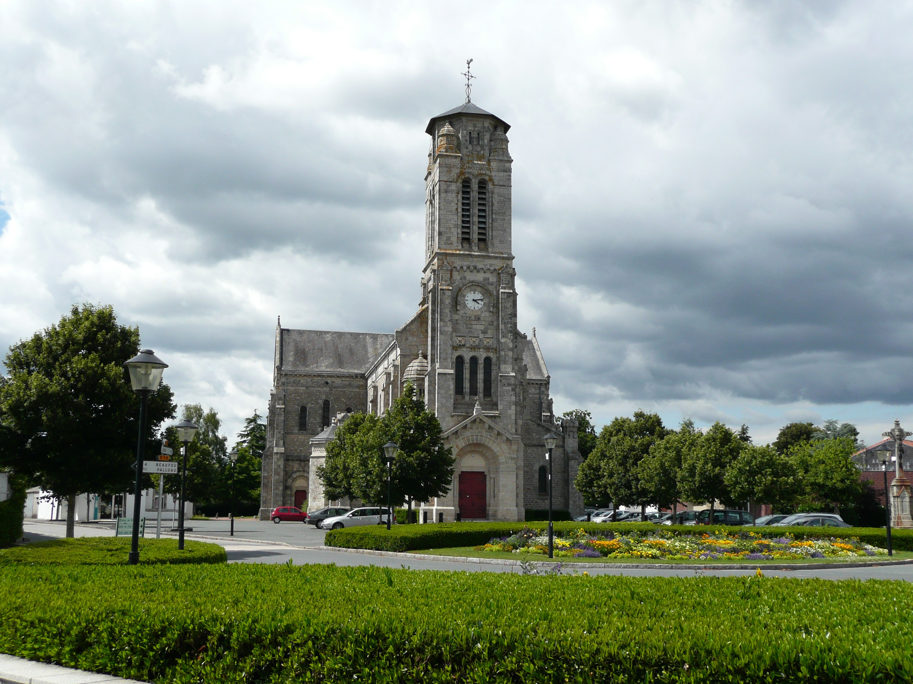 Eglise des Lucs-sur-Boulogne